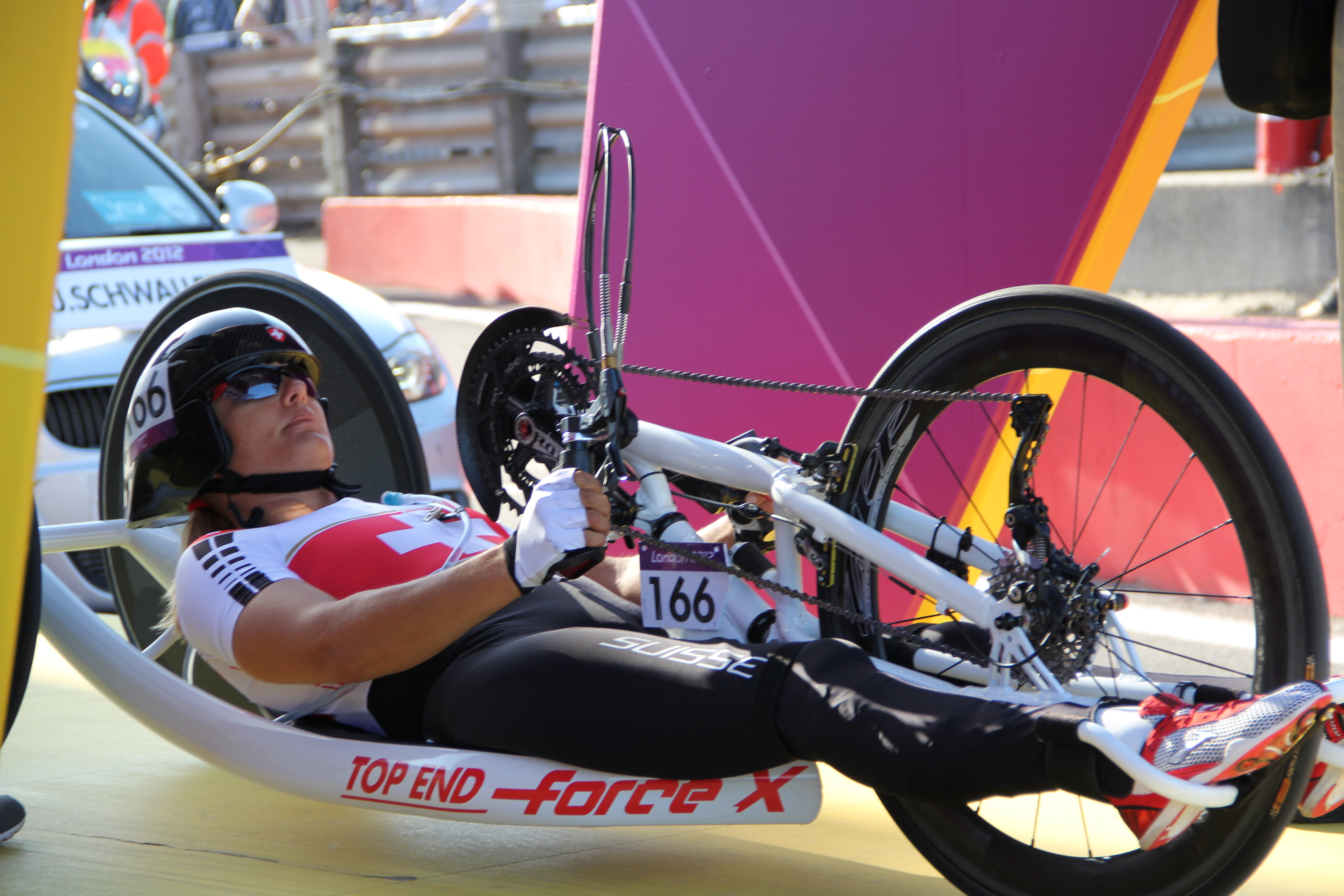 Start Einzelzeitfahren Paralympics London 2012